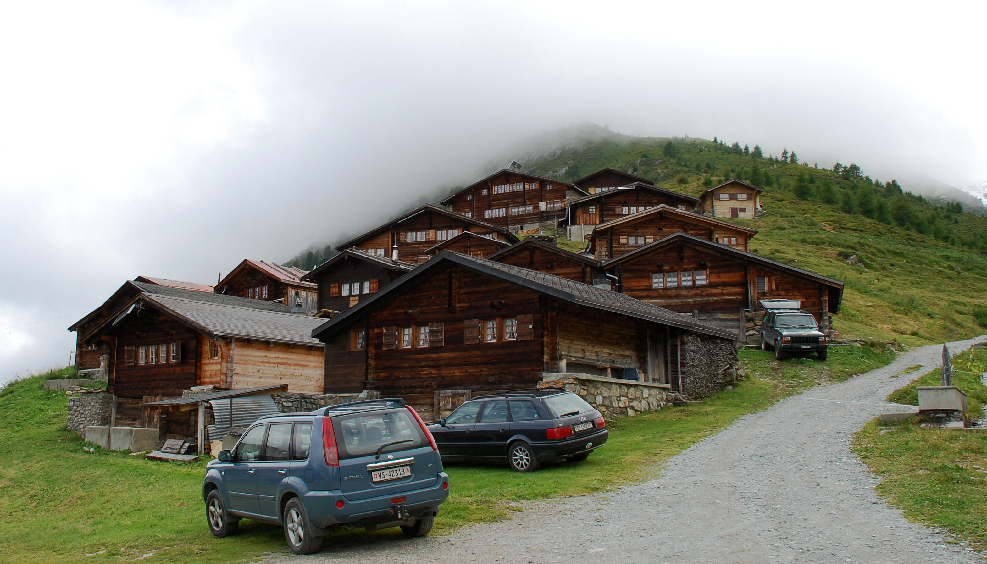 en.: Faldumalp at Lötschental, Switzerland; dt.: Faldumalp im Lötschental, Schweiz